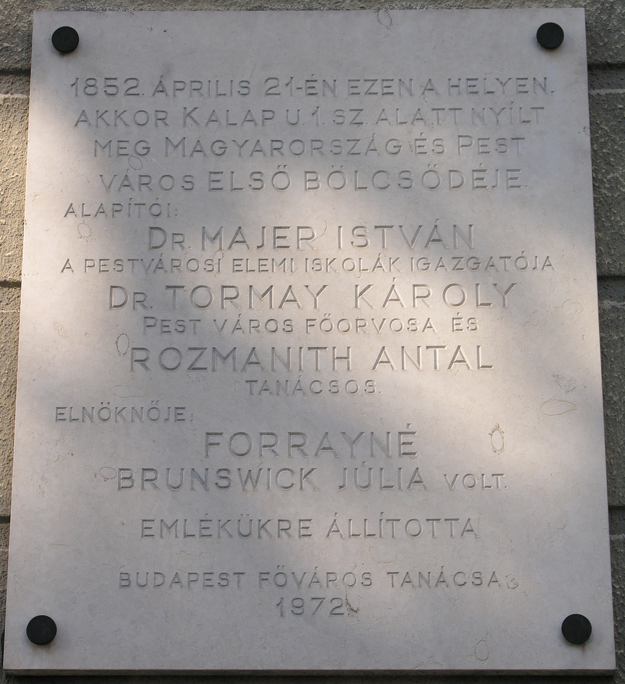 Pest első bölcsödéjének emléktáblája, Budapest, V., Belgrád rakpart 27. (akkor Kalap utca 1.). Felirata: 1852. április 21-én ezen a helyen, akkor Kalap u. 1. sz. alatt nyílt meg Magyarország és Pest város első bõlcsődéje. Alapítói: Dr. Majer István a pestvárosi elemi iskolák igazgatója Dr. Tormay Károly Pest város főorvosa és Rozmanith Antal tanácsos. Elnöknője: Forrayné Brunswick Júlia volt Emlékükre állította Budapest főváros tanácsa 1972